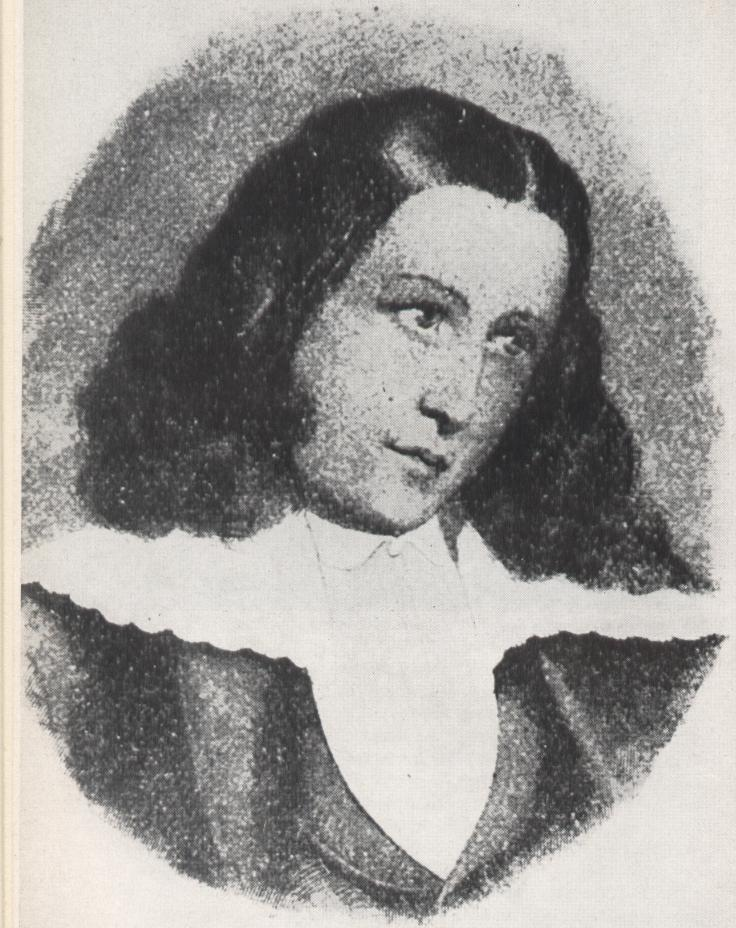 Der spätere Karmelit Hermann Cohen (1820-1871) als junger Pianist, Paris, um 1835